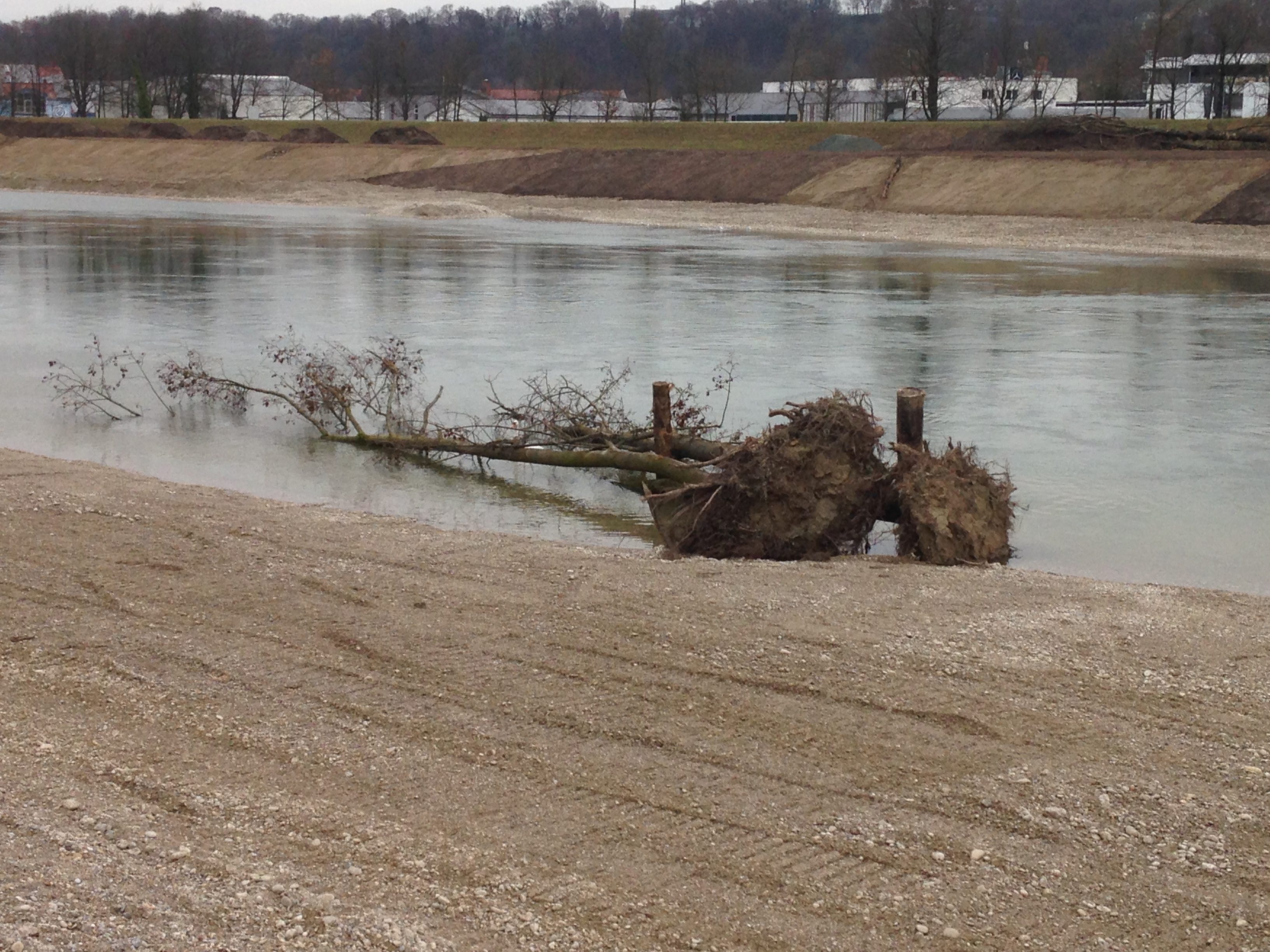 Raubaum, der im Rahmen der Flussrenaturierung der Isar am Ufer bei Dingolfing befestigt wurde